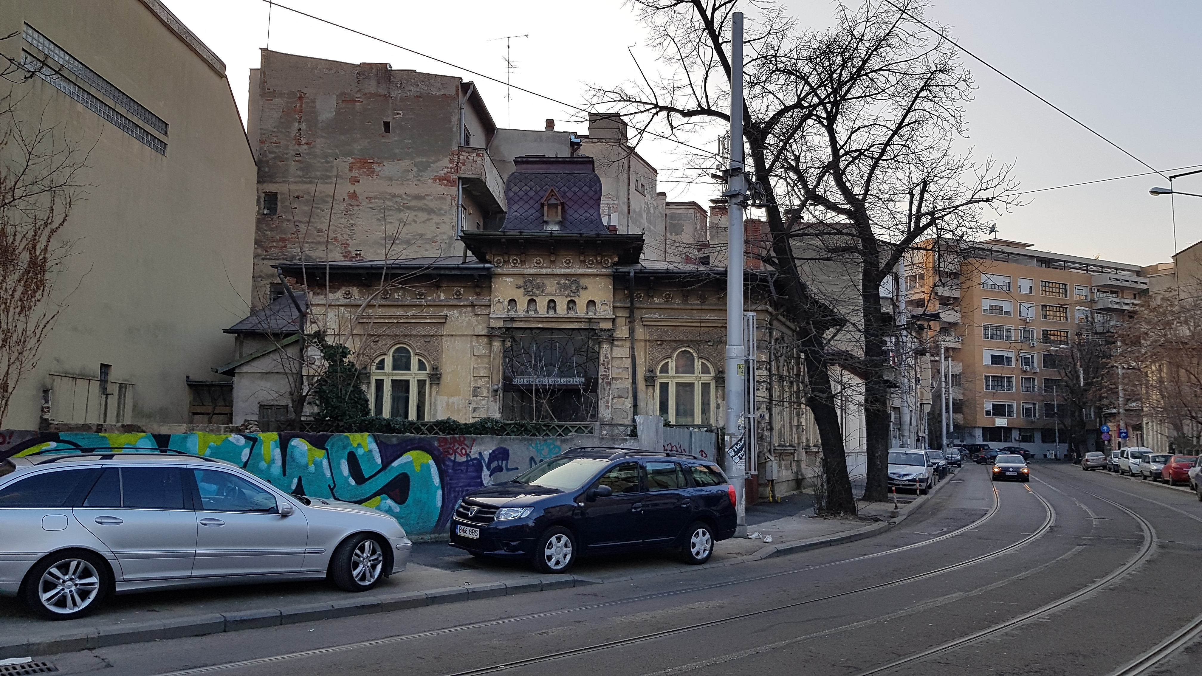 Casă, monument istoric